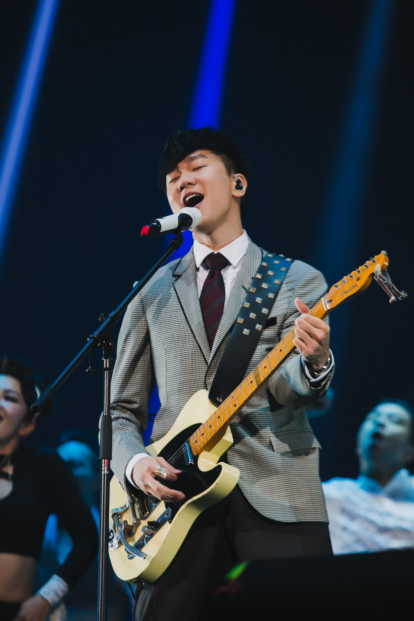 中文（台灣）: 第十二屆 KKBOX 風雲榜－林俊傑演出